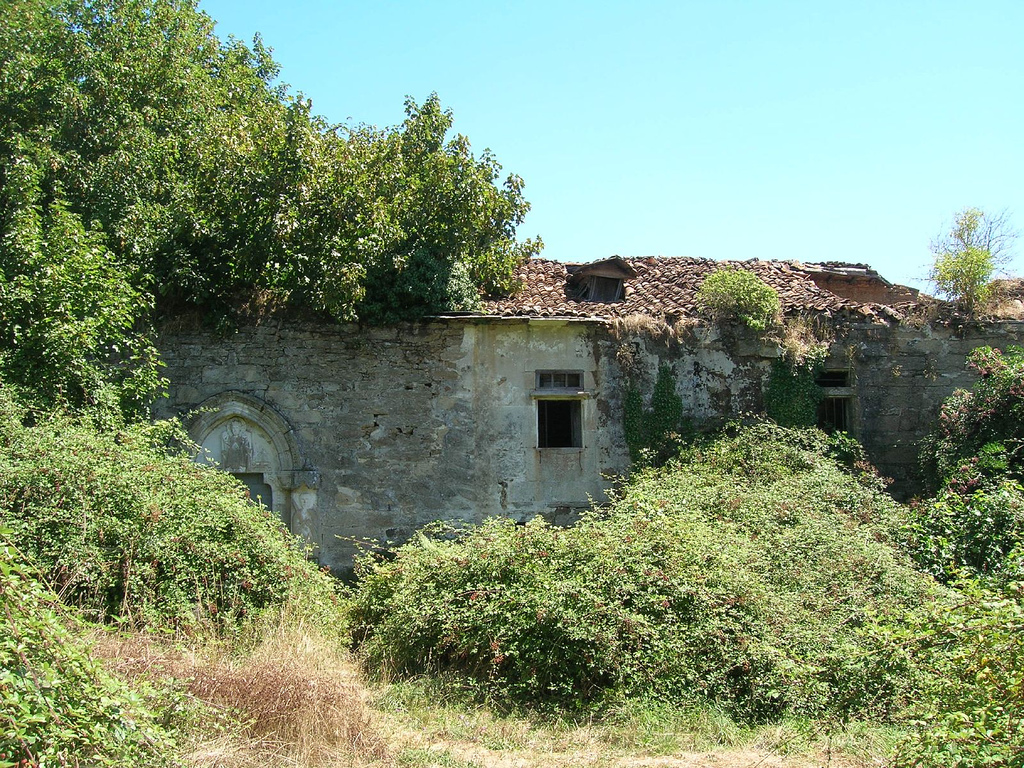 Mosteiro de San Paio de Abeleda